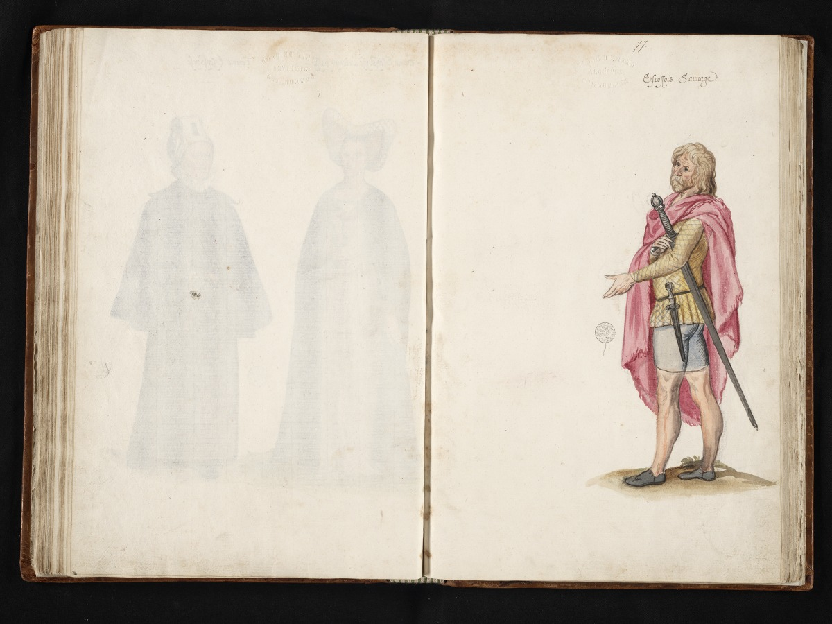 "Дикий шотландец", акварель Лукаса де Геера из книги "Théâtre de tous les peuples et nations de la terre avec leurs habits et ornemens divers, tant anciens que modernes, diligemment depeints au naturel par Luc Dheere peintre et sculpteur Gantois"